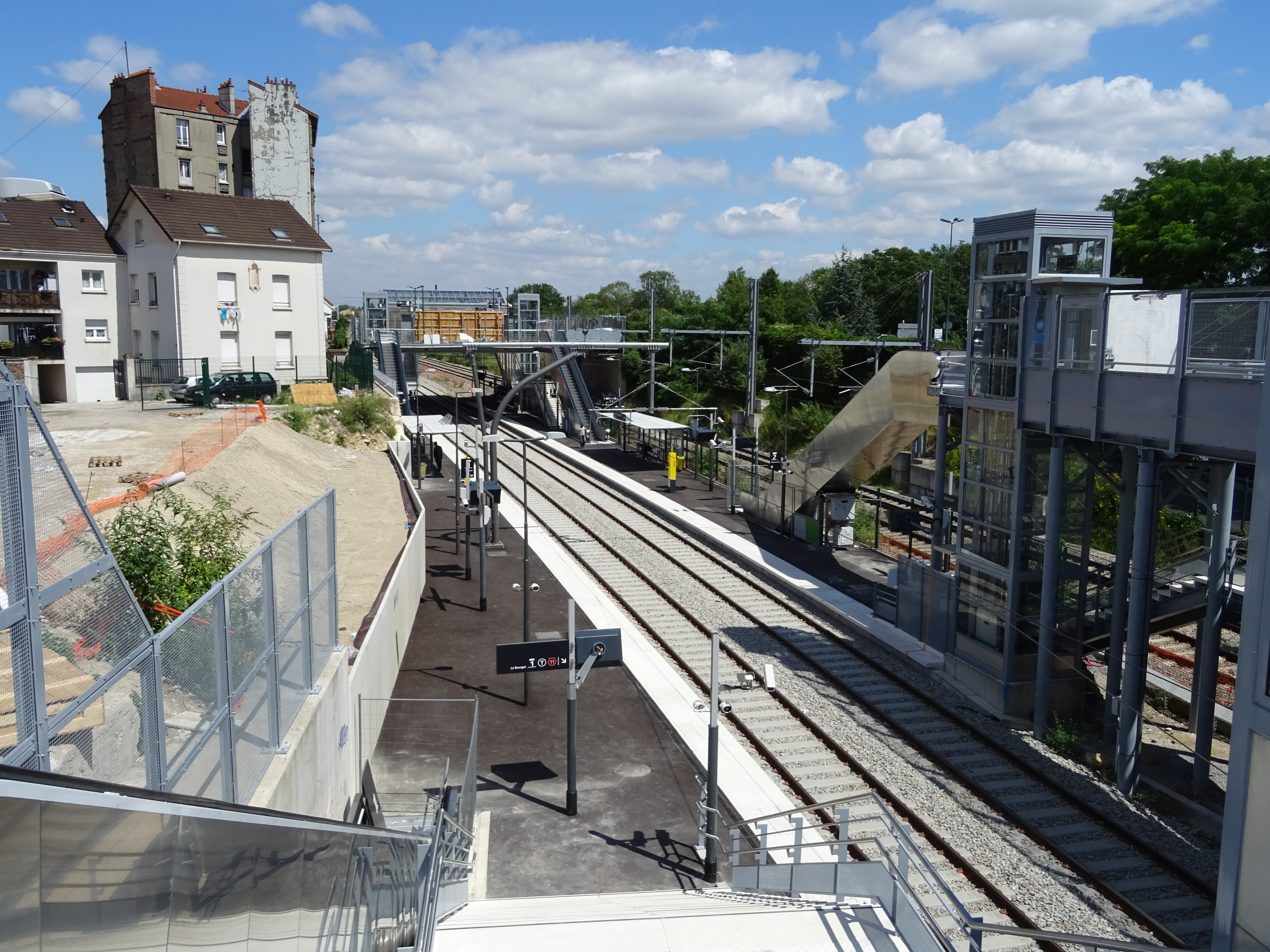 Vue d'ensemble de la gare d'Epinay-Villetaneuse T11 Express depuis la passerelle de correspondance avec le Transilien H